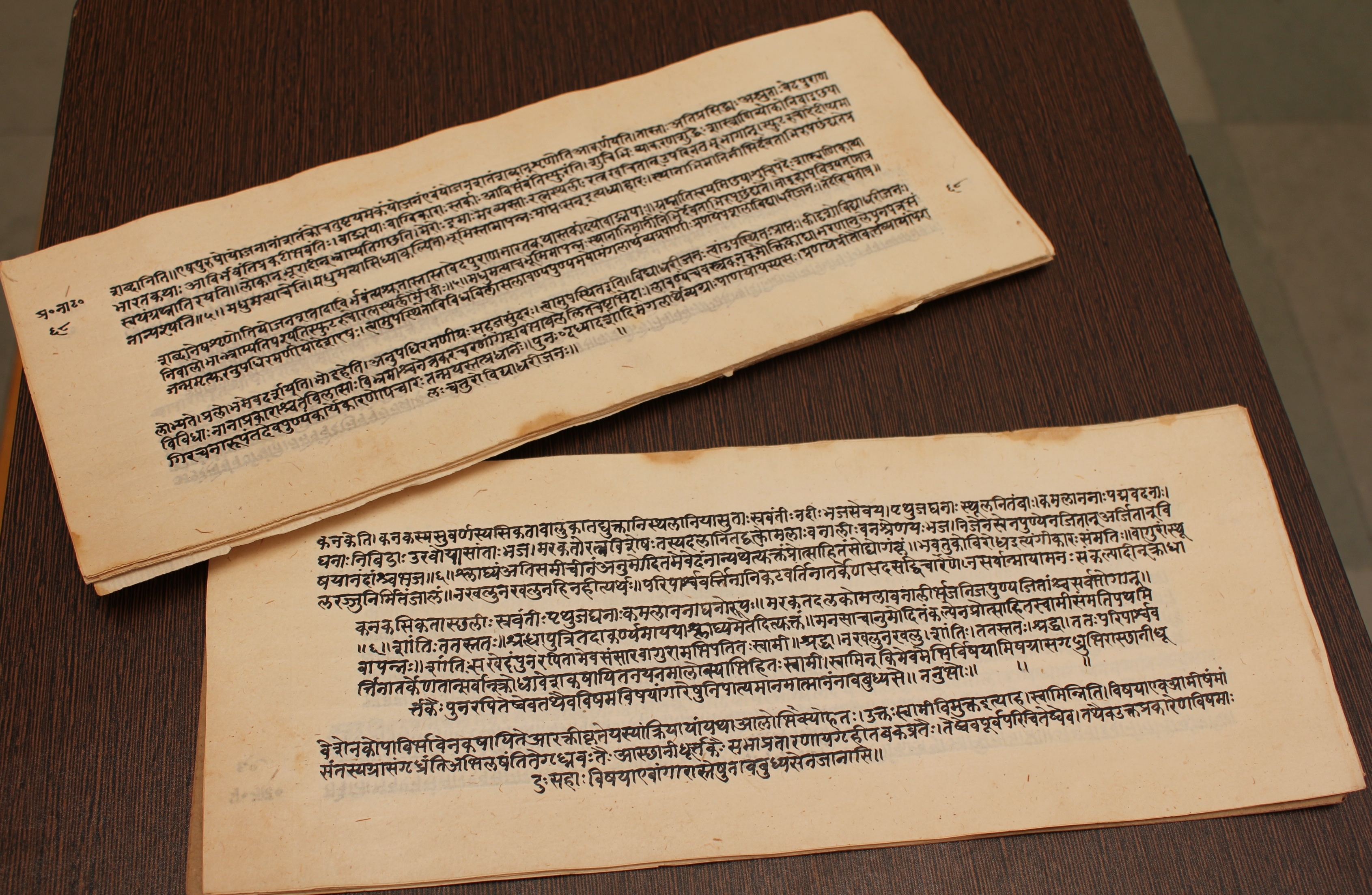 संस्कृत हस्तलिखित